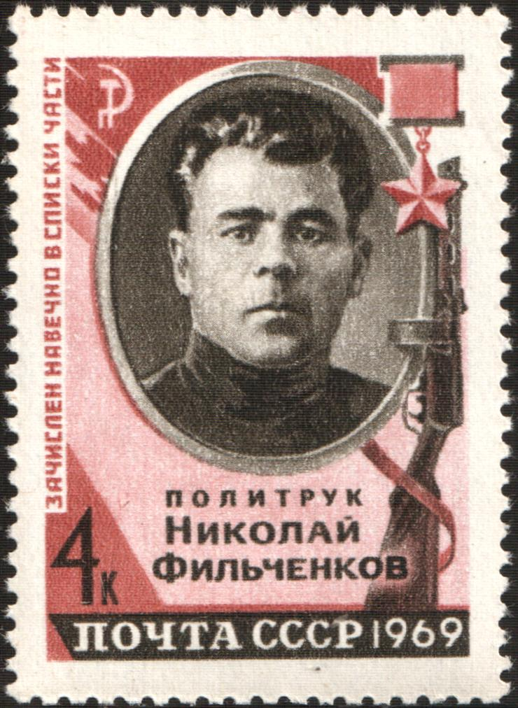 Почтовая марка СССР - Фильченков Николай Дмитриевич, Герой Советского Союза